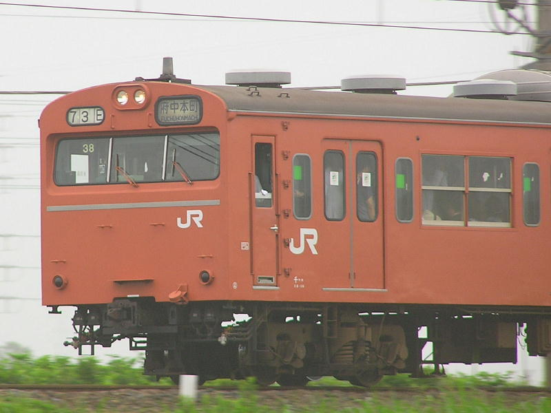 東浦和付近を走行中の武蔵野線103系非ATC車。